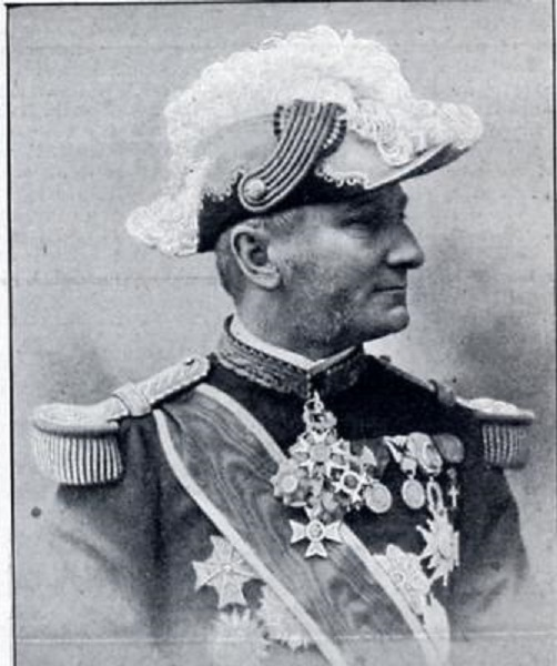 L'amiral Marie Edgar de Maigret (1841-1910)